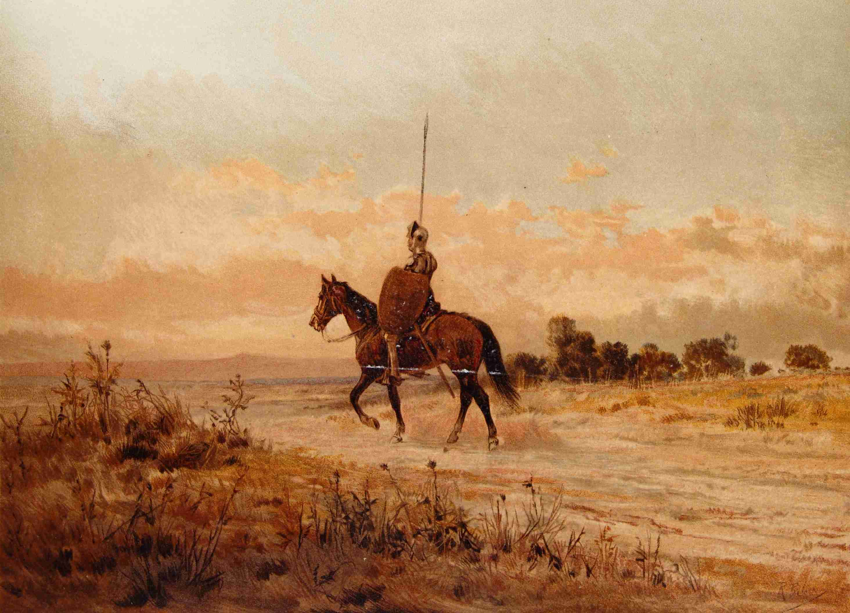 202_008_quijote_cap02